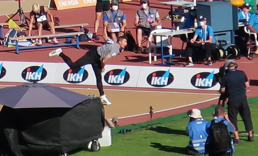 Antti Ruuskanen keihäänheiton loppukilpailun suorituksessaan Kalevan kisoissa 2020.